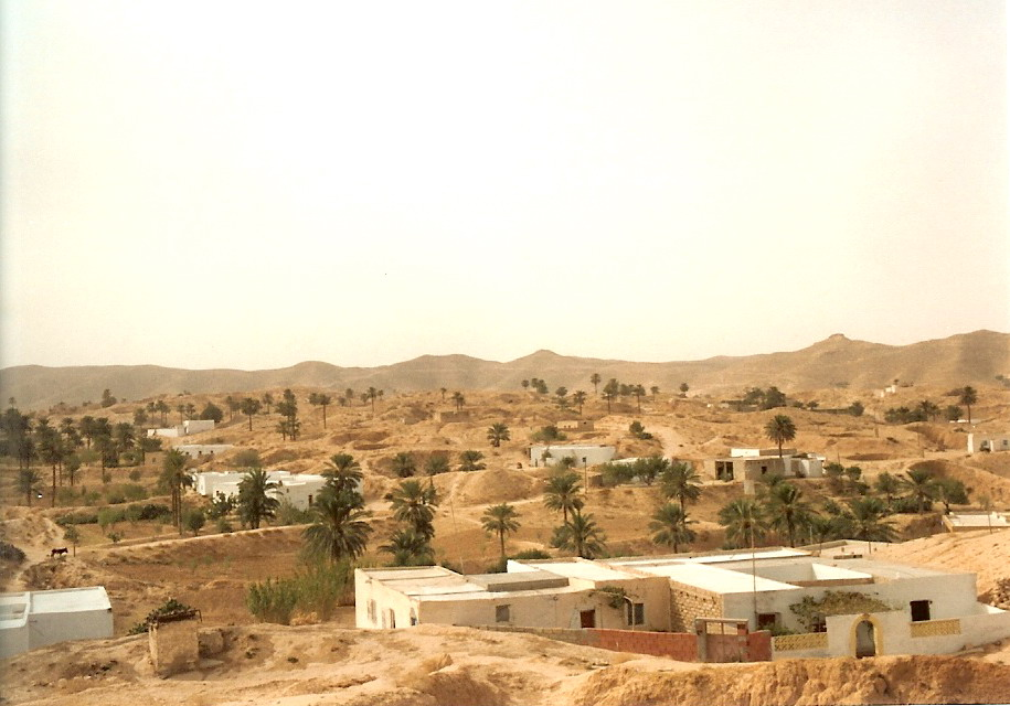 Paysage près de Matmata (Tunisie)